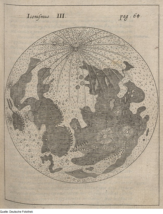 Original image description from the Deutsche FotothekAstronomie & Laufbahn & Mond